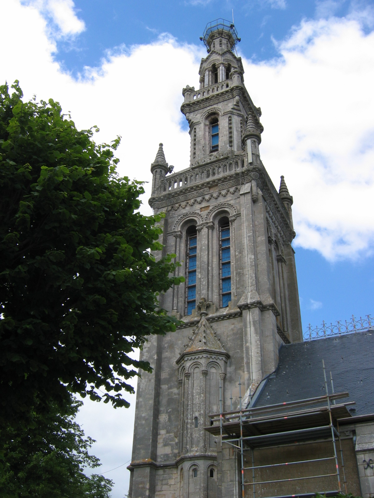 Le clocher de la basilique sans la statue mariale. Notre Dame de Sion.